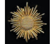 Sol del Cuerpo de Intendencia de la Armada